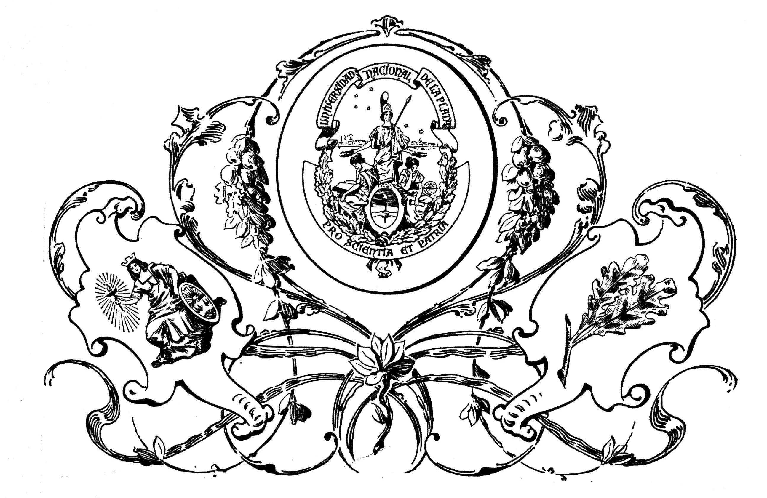 logo universidad provincial